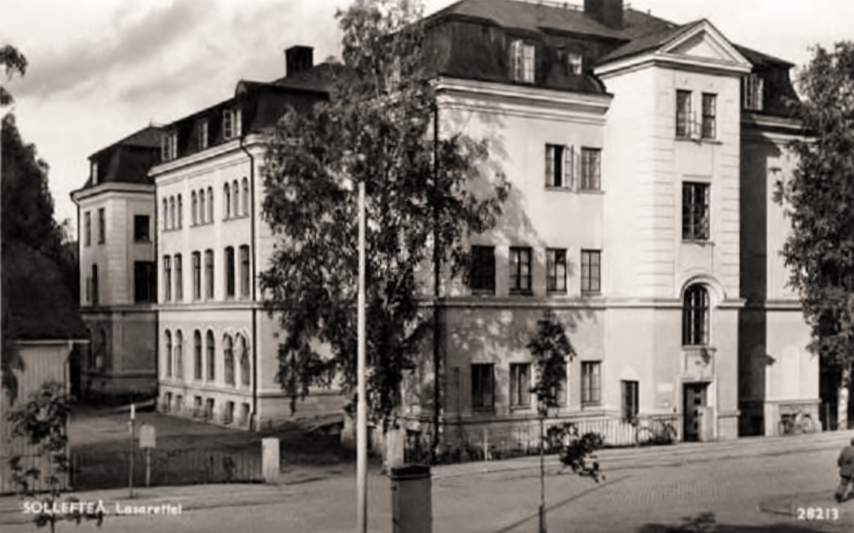 Gamla lasarettet på Storgatan i Sollefteå.